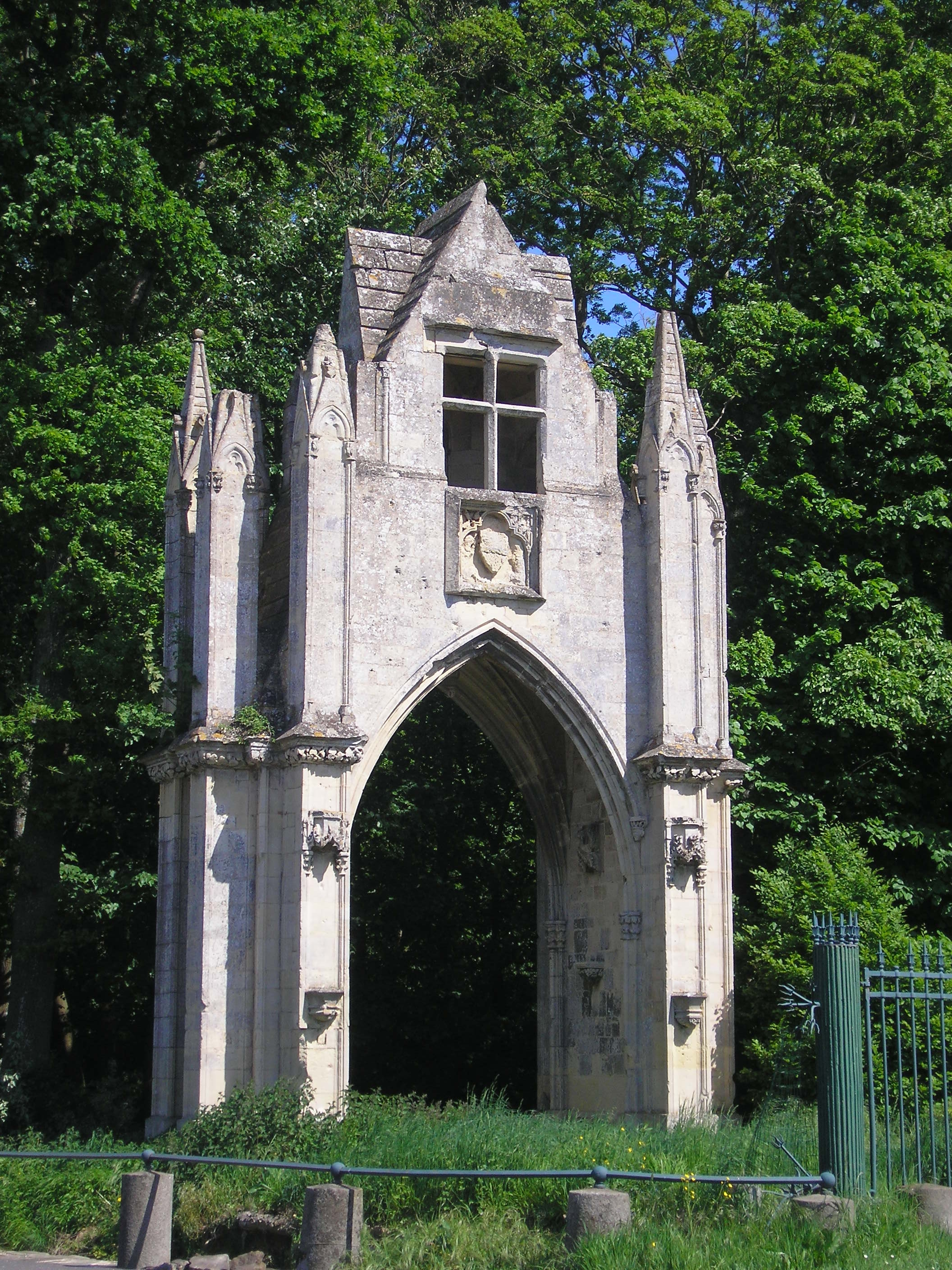 Banneville-la-Campagne (Normandie, France). La porte de l'abbaye Saint-Martin de Troarn, démontée puis remontée à Banneville.